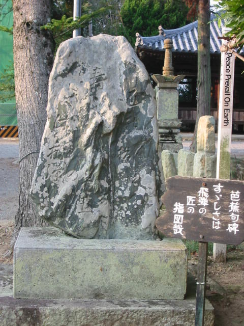 tombe de Matsuo Bashō à Ōtsu, préfecture de Shiga